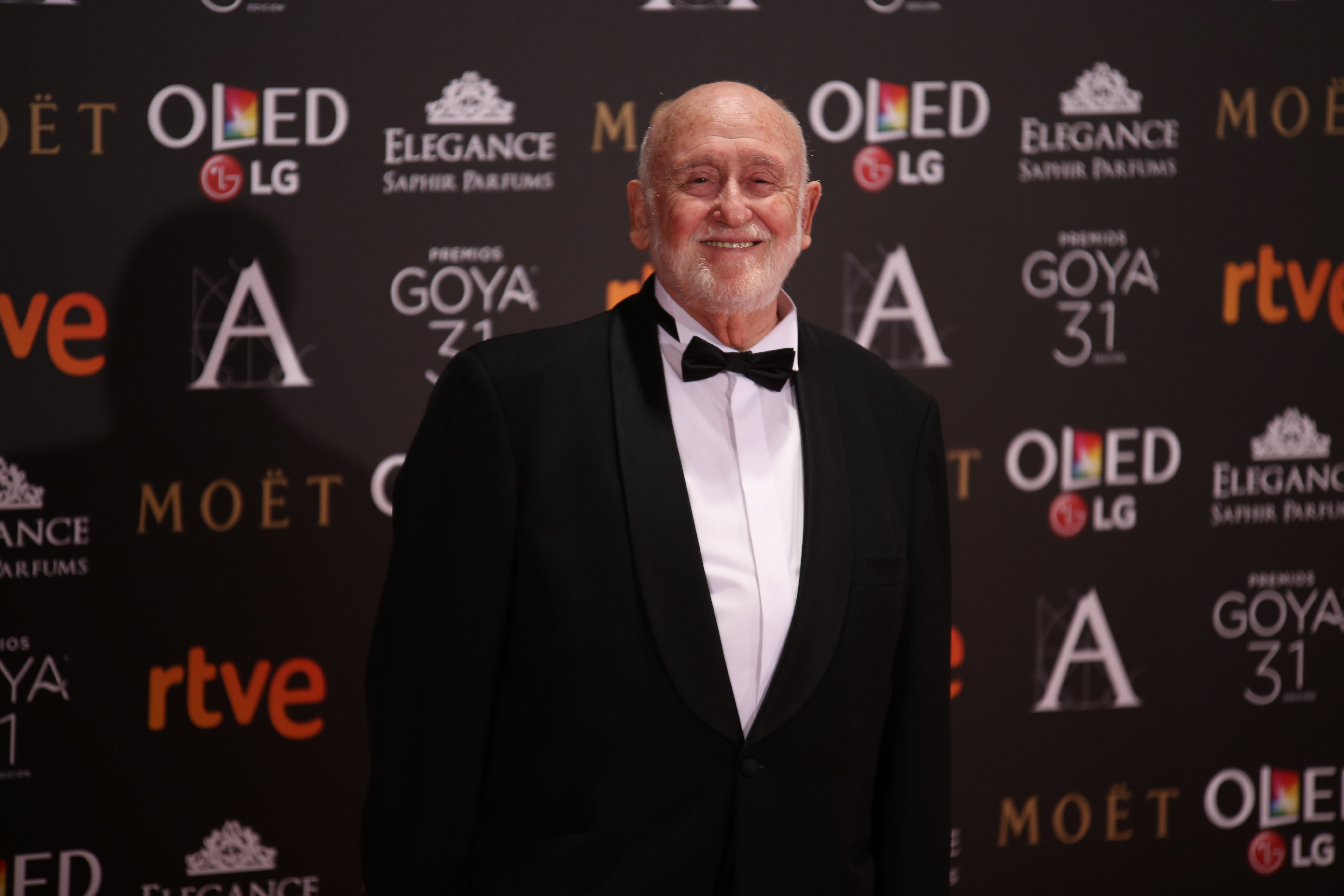 Premios Goya 2017